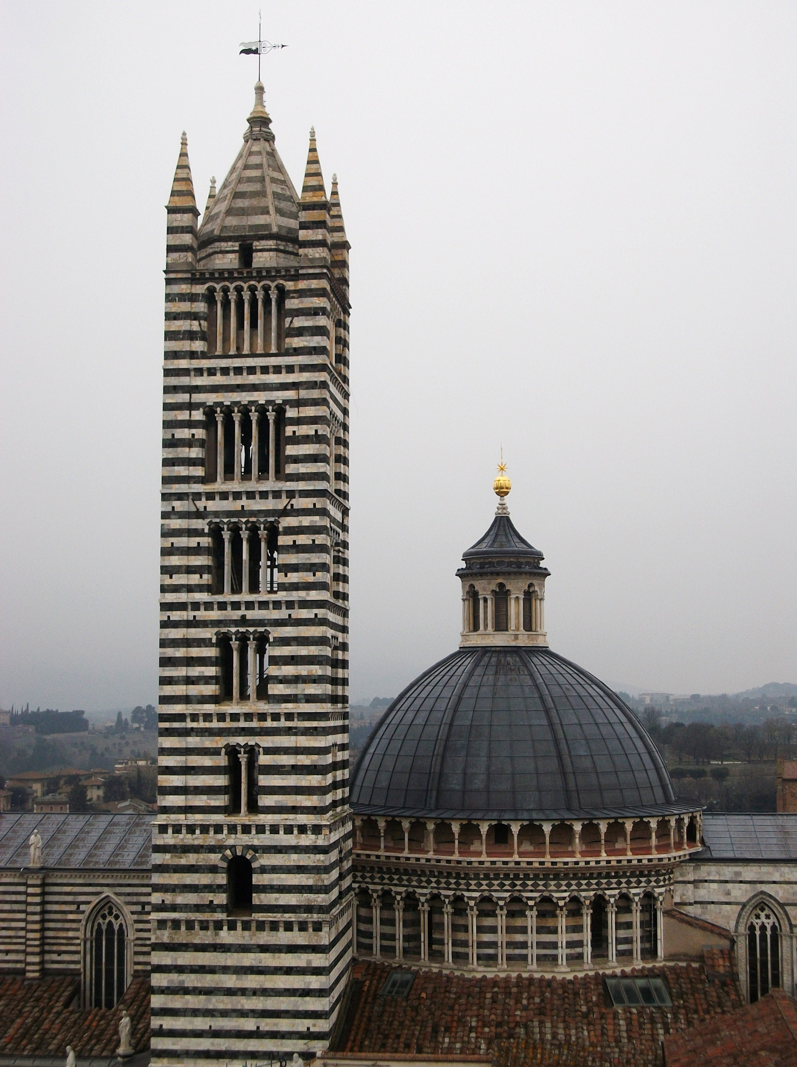 Campanar i cúpula de la catedral de Siena.